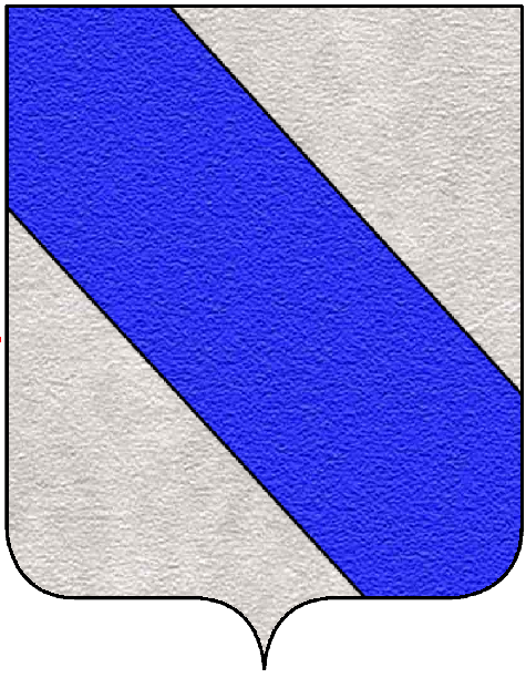 Stemma della famiglia Sanudo, appartenente al patriziato di Venezia.